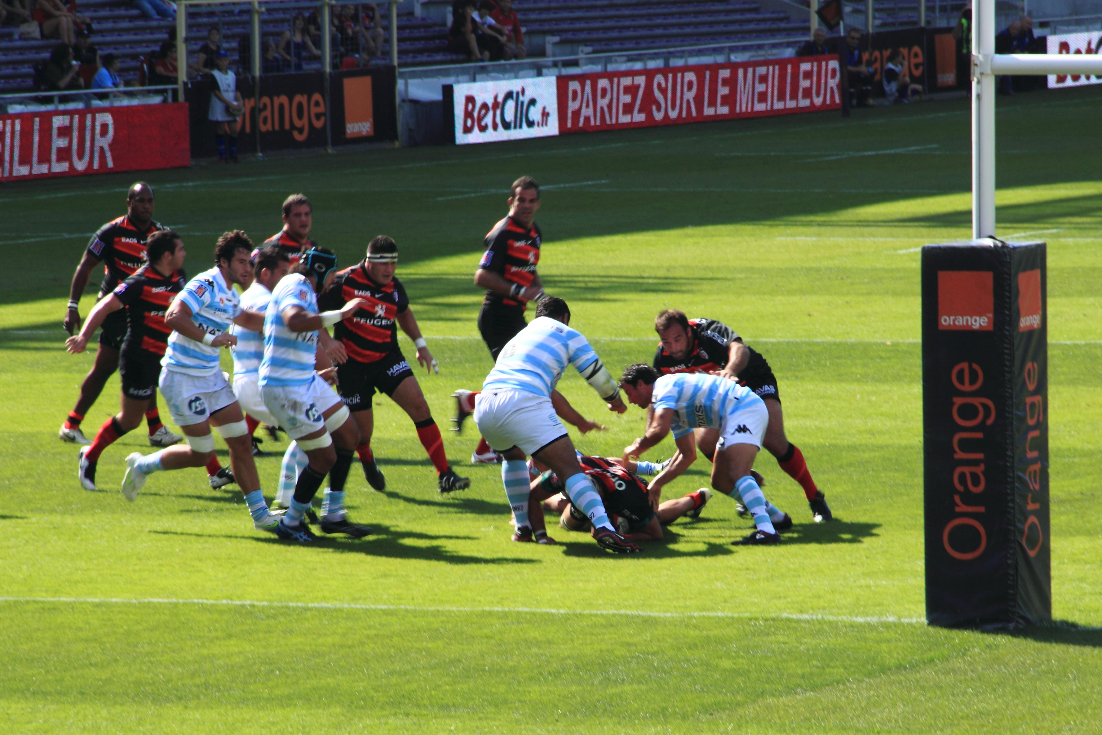 Gilian Gallan à terre, juste avant la formation d'un ruck, lors du match Stade Toulousain / Racing Métro 92 du 10 septembre 2011